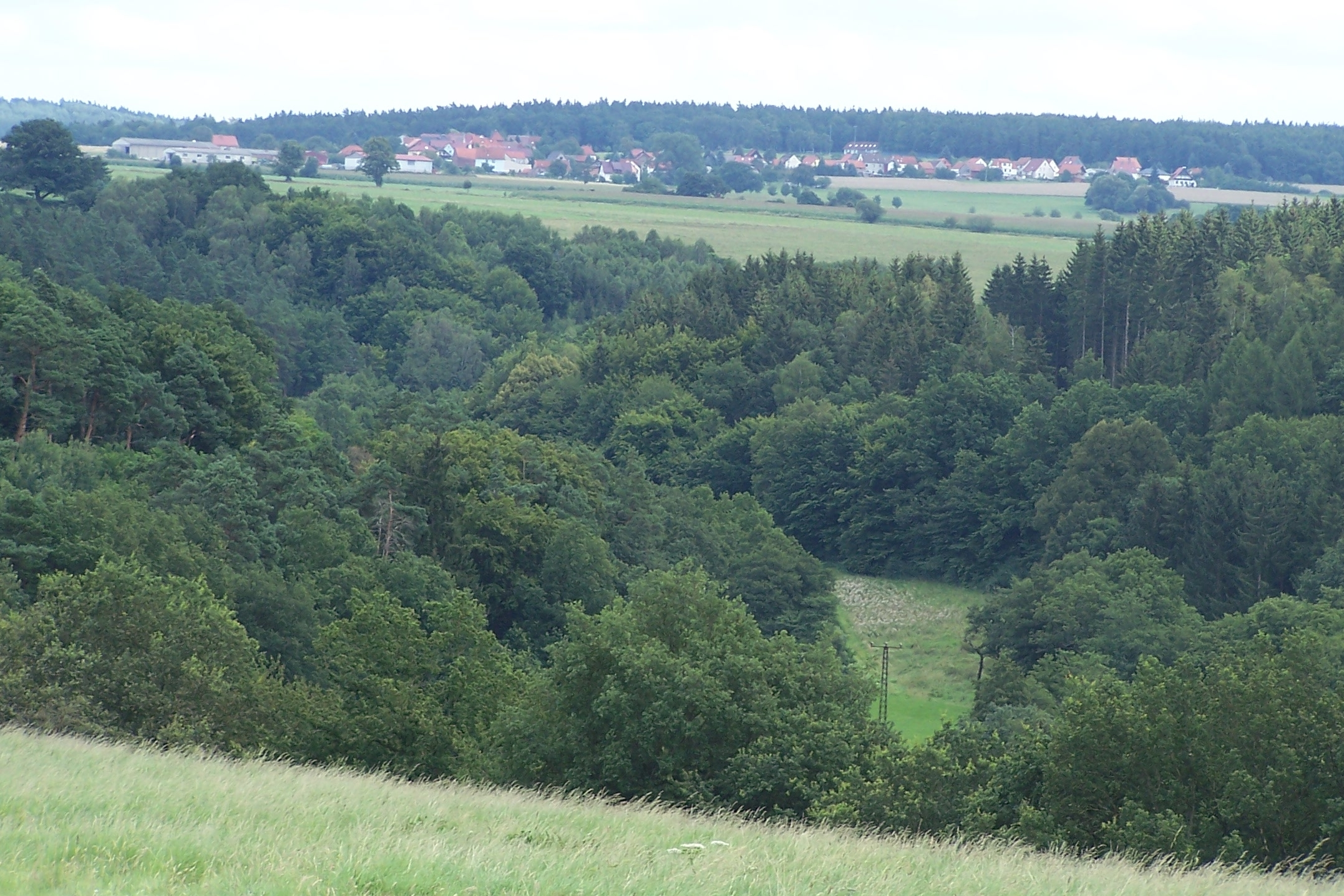 Ansicht des Orts von Westen (St.-Annen bei Vacha).